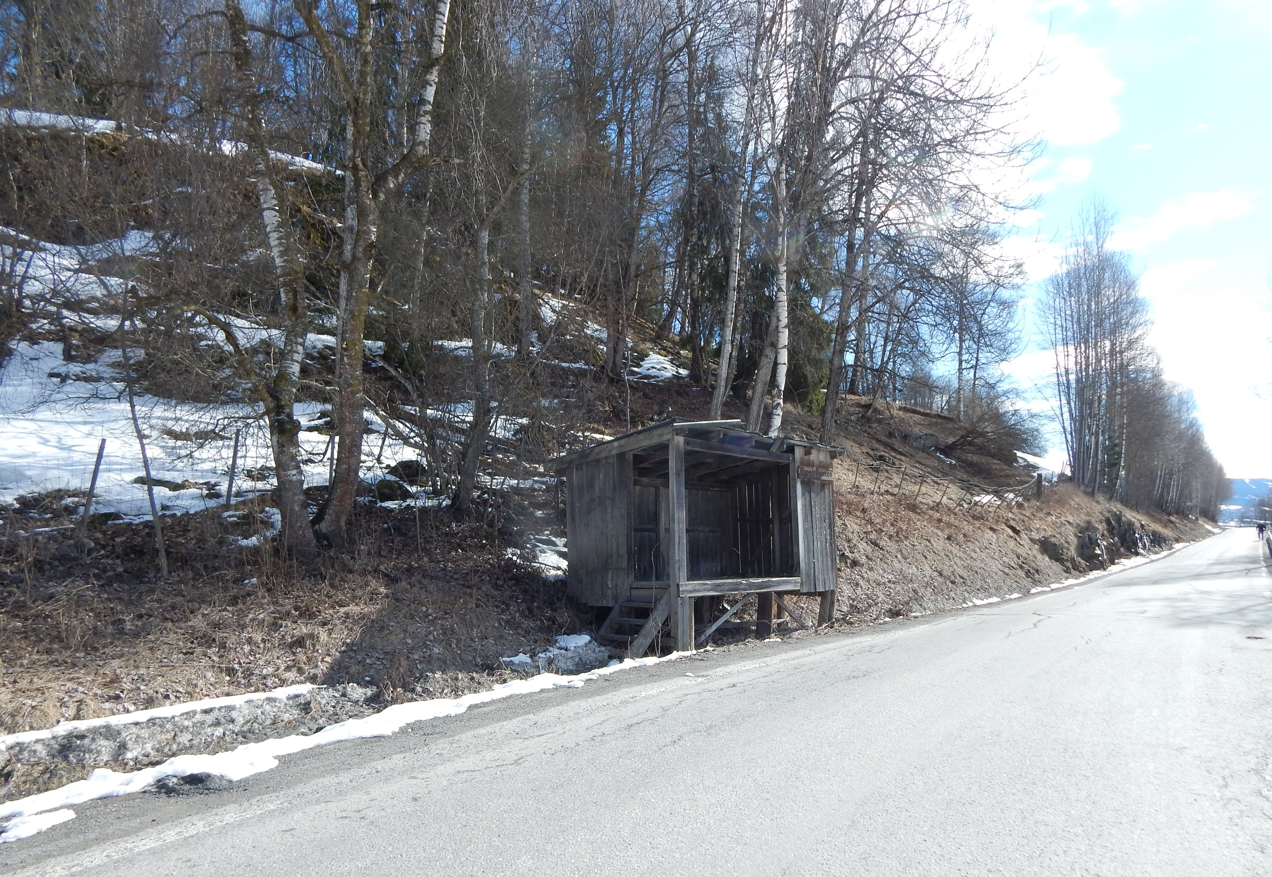 Øverbygdsvegen (fylkesvei 2530, tidl. 318)